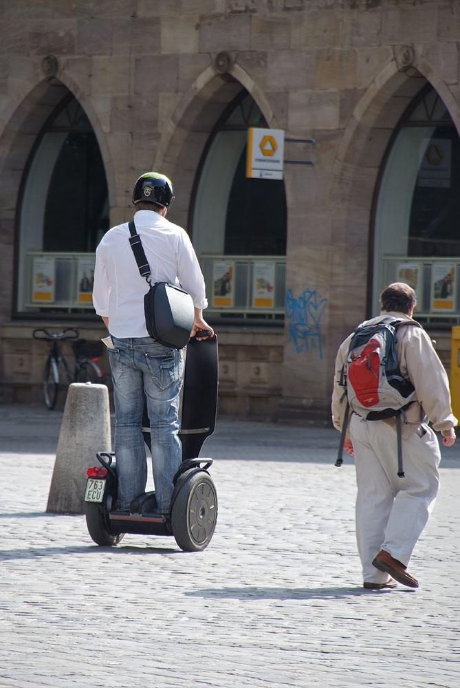 Steh-Elektroroller (Tourist in Nürnberg)